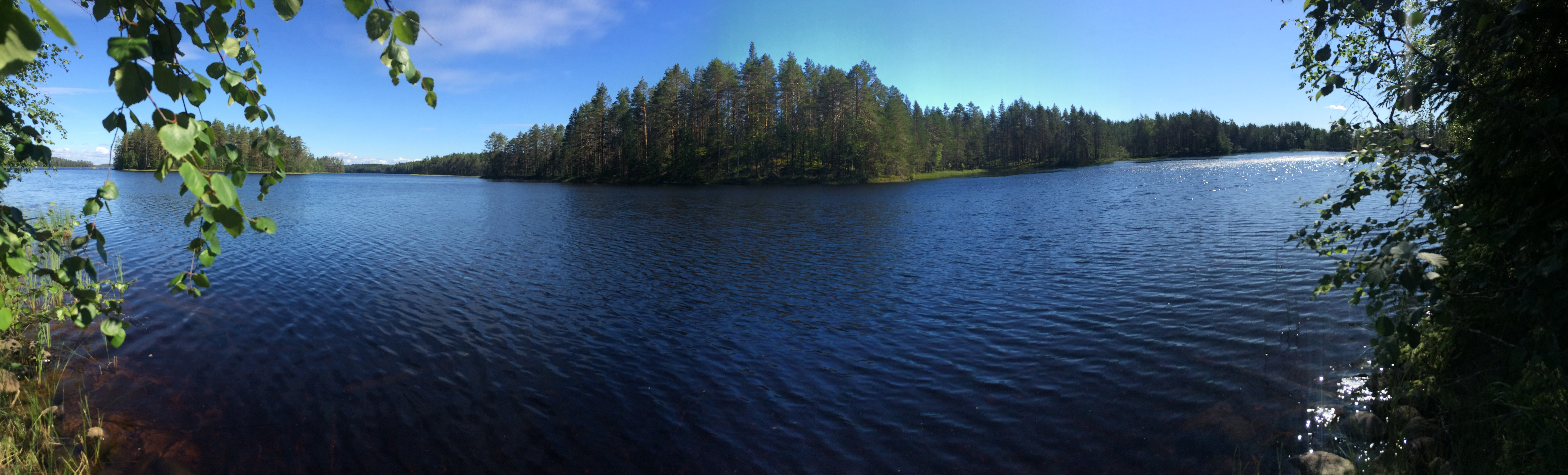 Хирвасъярви (озеро, Суоярвский район)